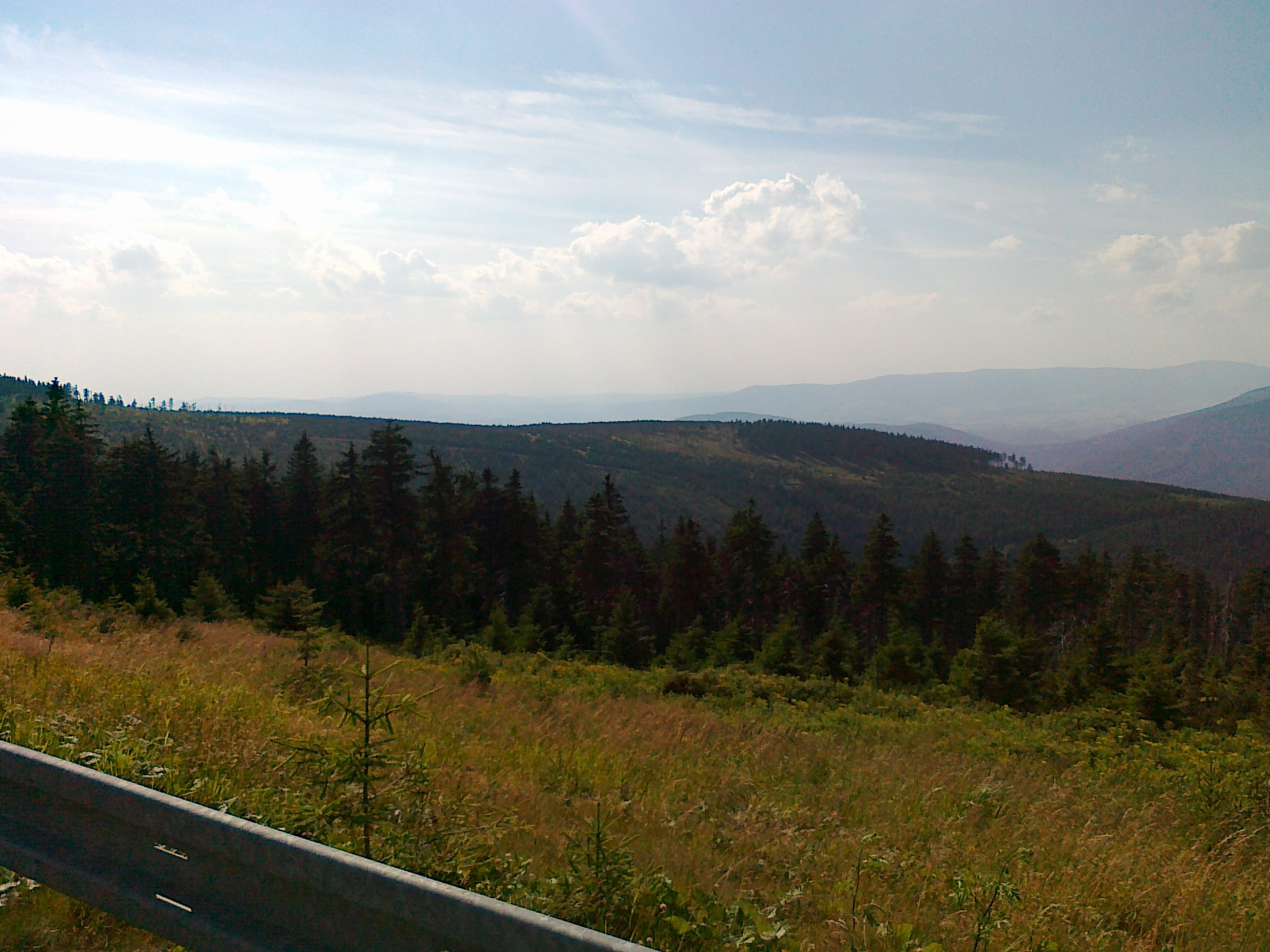 Widok z dolnej alei wokół góry Dlouhé stráně na Kamenec (1)